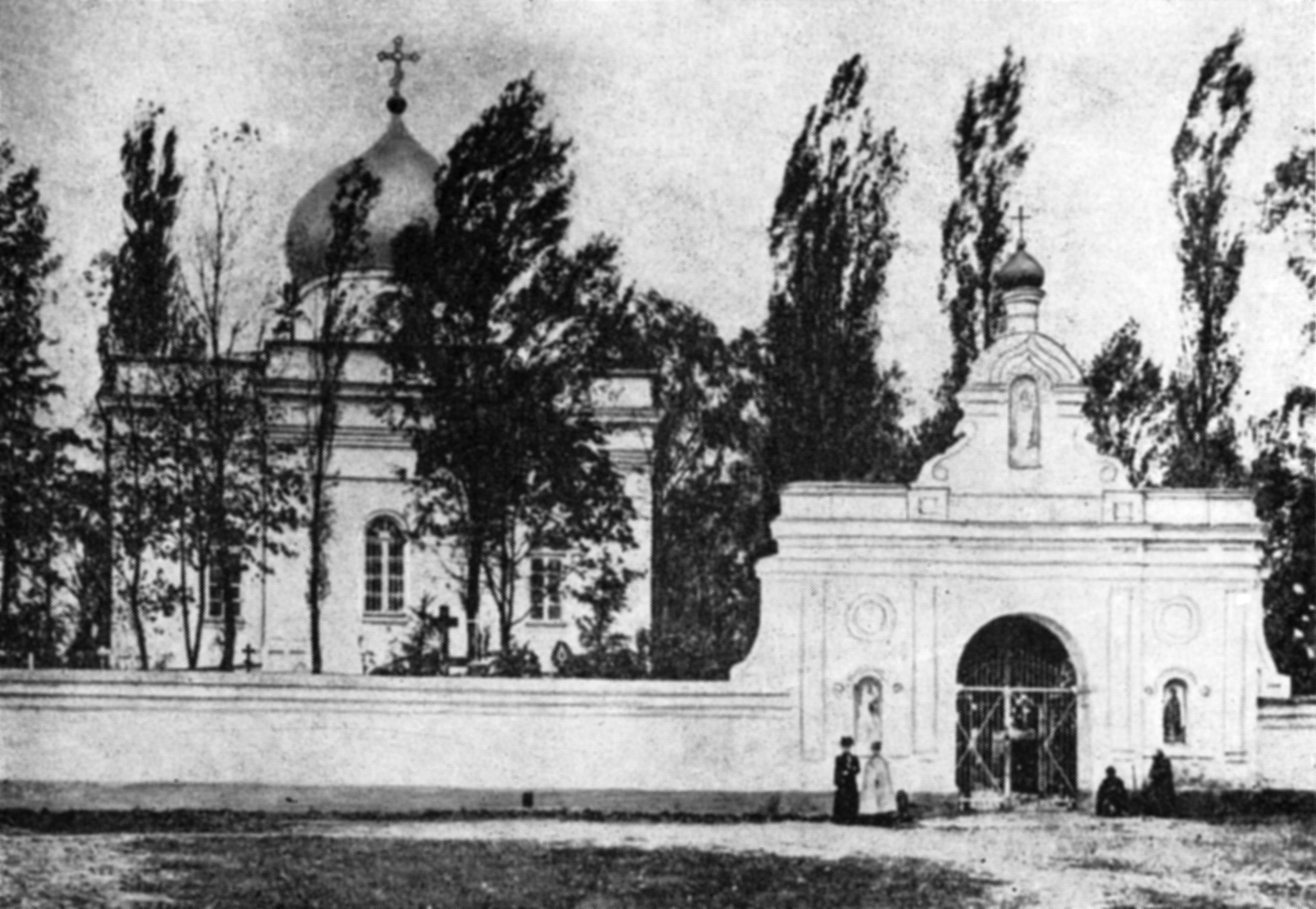 Беларуская (тарашкевіца): Менск (Miensk), Старажоўка (Staražoŭka). Царква Сьвятой Марыі Магдаліны, брама